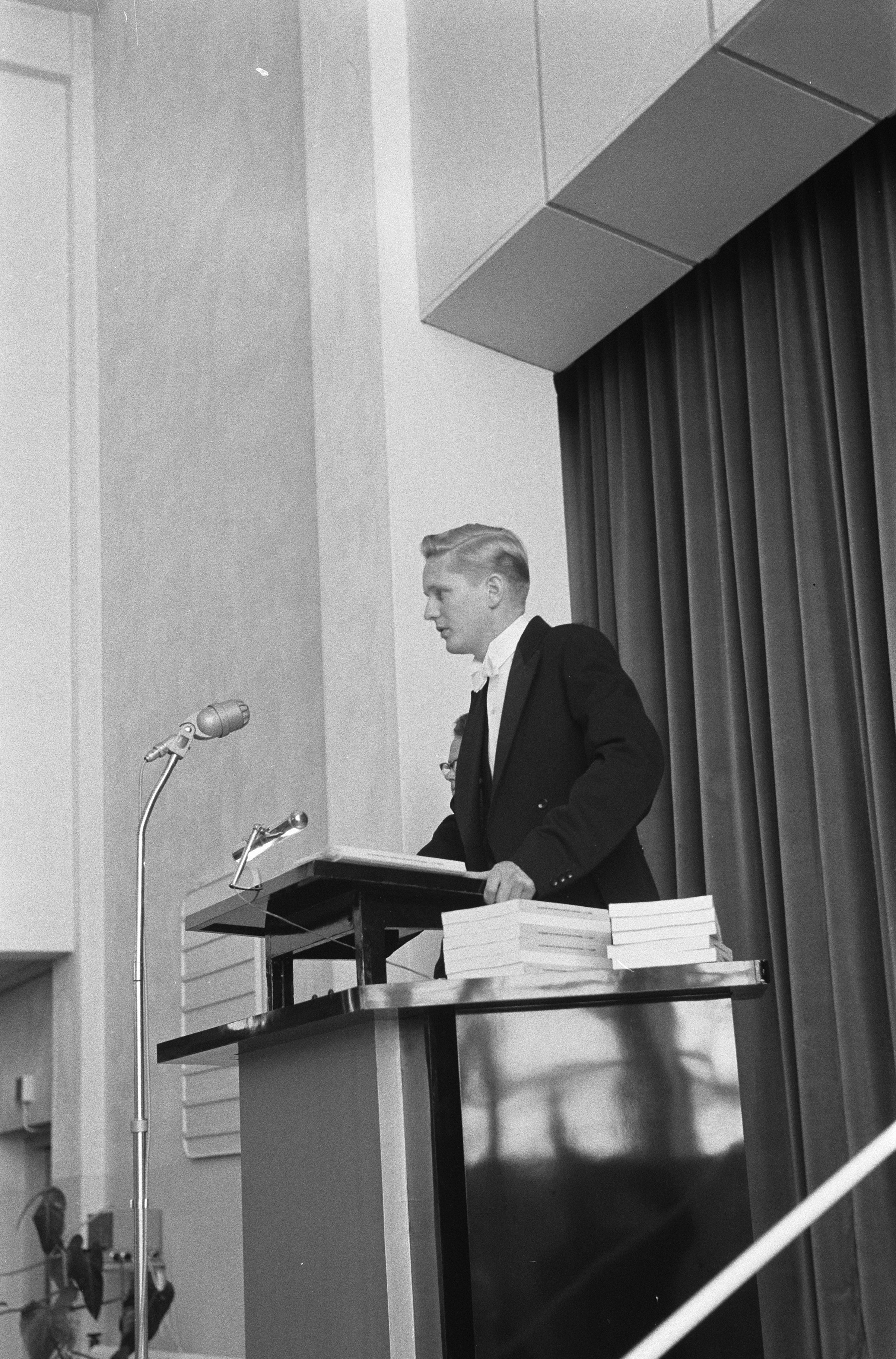 Collectie / Archief : Fotocollectie Anefo Reportage / Serie : [ onbekend ] Beschrijving : Promotie tot dokter in de letter en wijsbegeerte van de 25-jarige Luitenant ter Zee der derde klasse KMR P. J. D. Drenth Datum : 3 juni 1960 Trefwoorden : PROMOTIES, doctors, letteren Persoonsnaam : Drenth, P.J.D. Fotograaf : Pot, Harry / Anefo Auteursrechthebbende : Nationaal Archief Materiaalsoort : Negatief (zwart/wit) Nummer archiefinventaris : bekijk toegang 2.24.01.05 Bestanddeelnummer : 911-3097